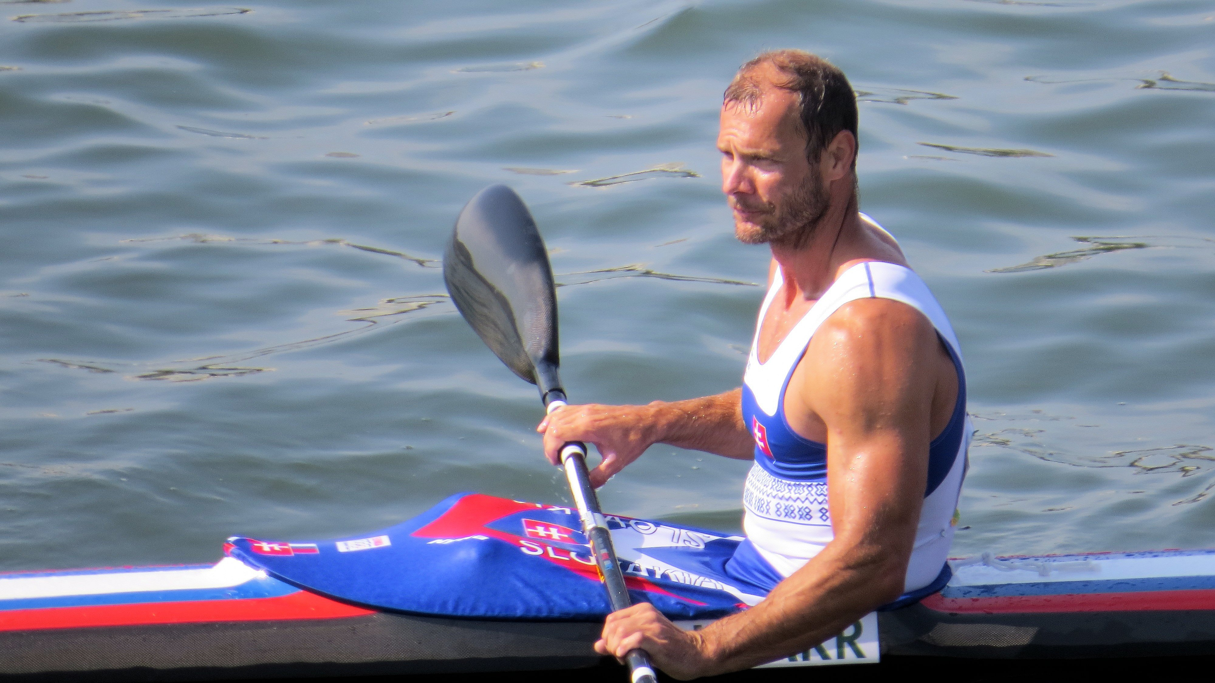 Sx50